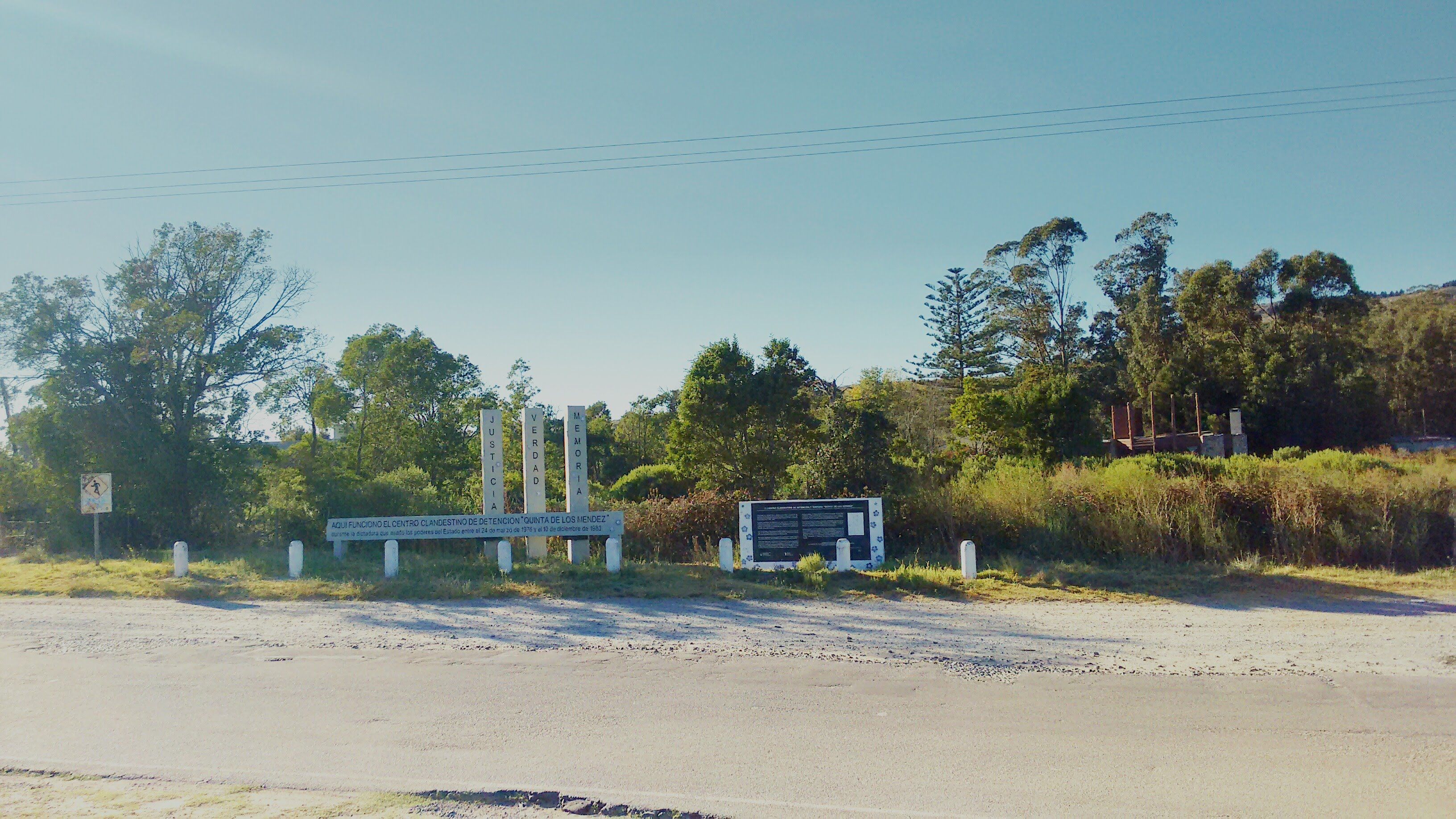 Foto de la señalización del Ex Centro Clandestino de Detención, que funcionó en la Quinta de los hermanos Méndez en Tandil, Provincia de Buenos Aires